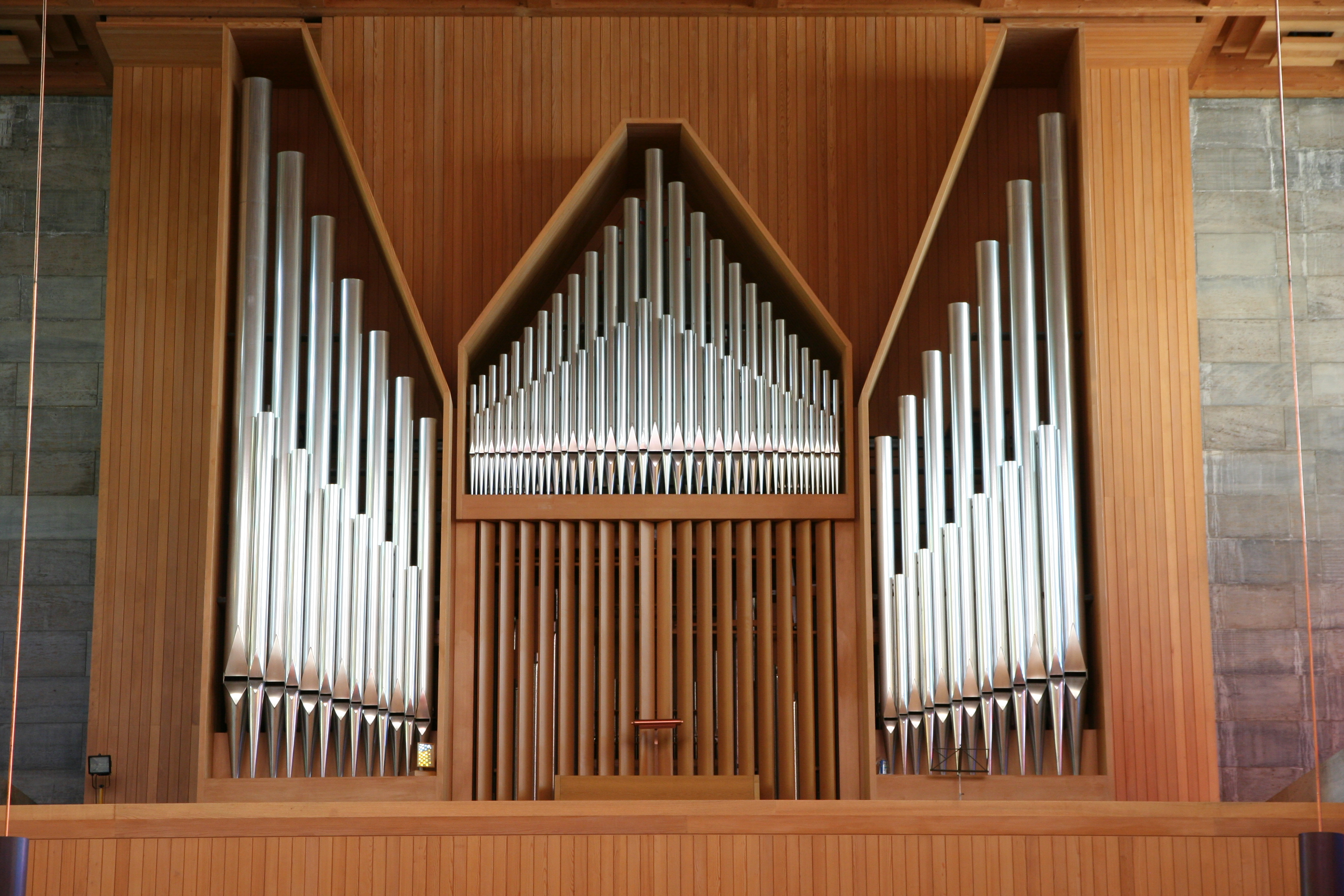 Krematorium Nordheim Zürich